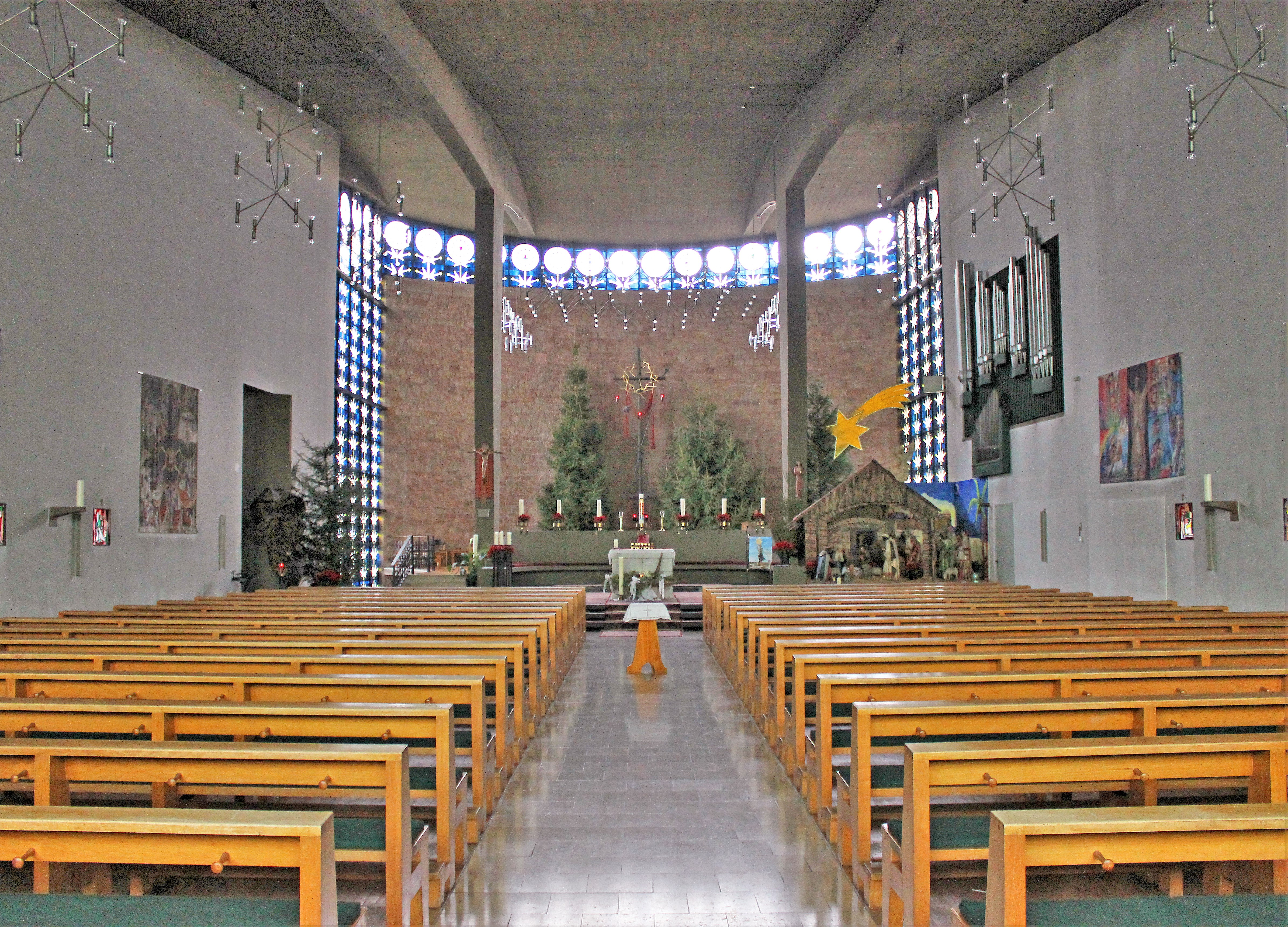 Blick ins Innere der katholischen Kirche St. Hildegard in Neuweiler, einem Stadtteil von Sulzbach (Saar), Regionalverband Saarbrücken, Saarland